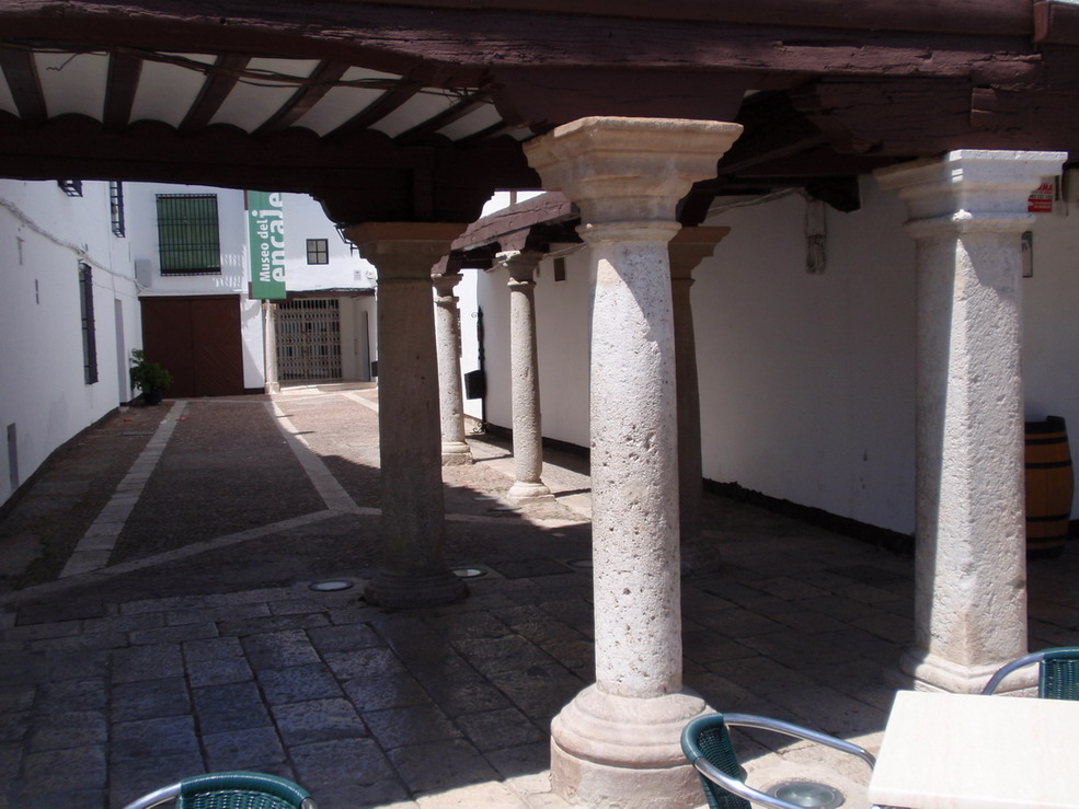 Almagro. Entrada del Museo del Encaje.